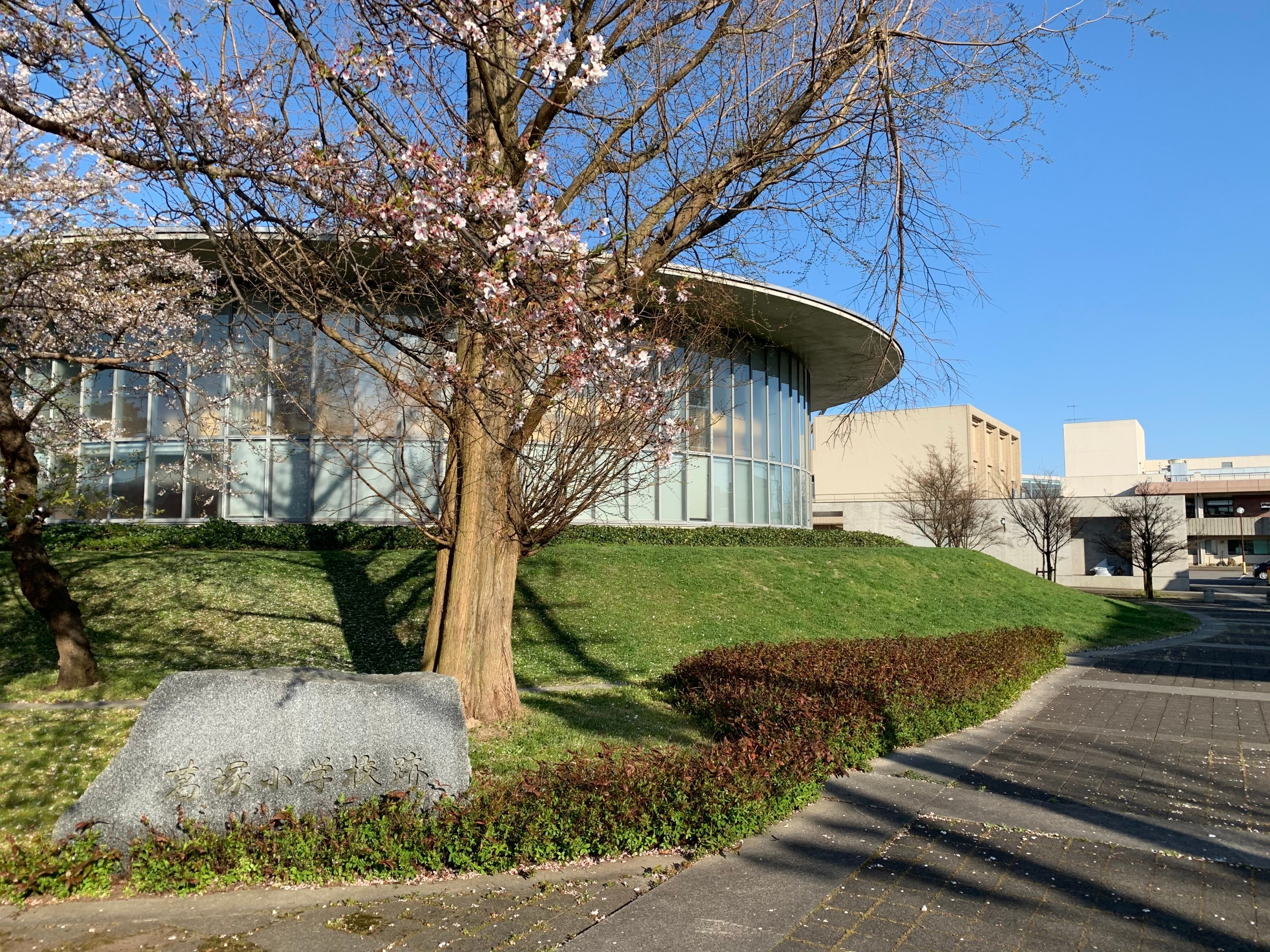 豊栄図書館と葛塚小学校跡の碑（2020年4月）